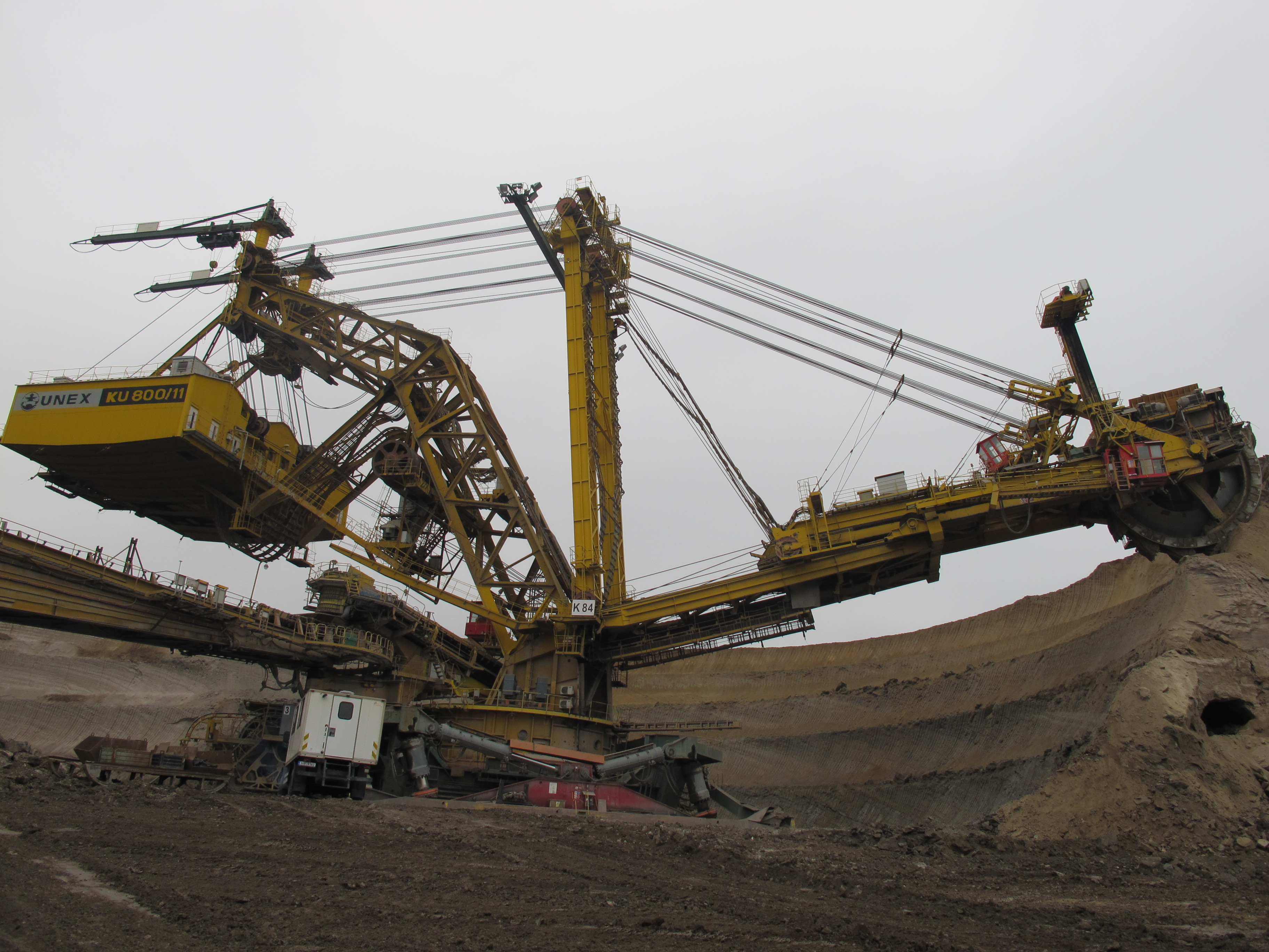 Uhelné safari na Lomu Vršany v říjnu 2014.